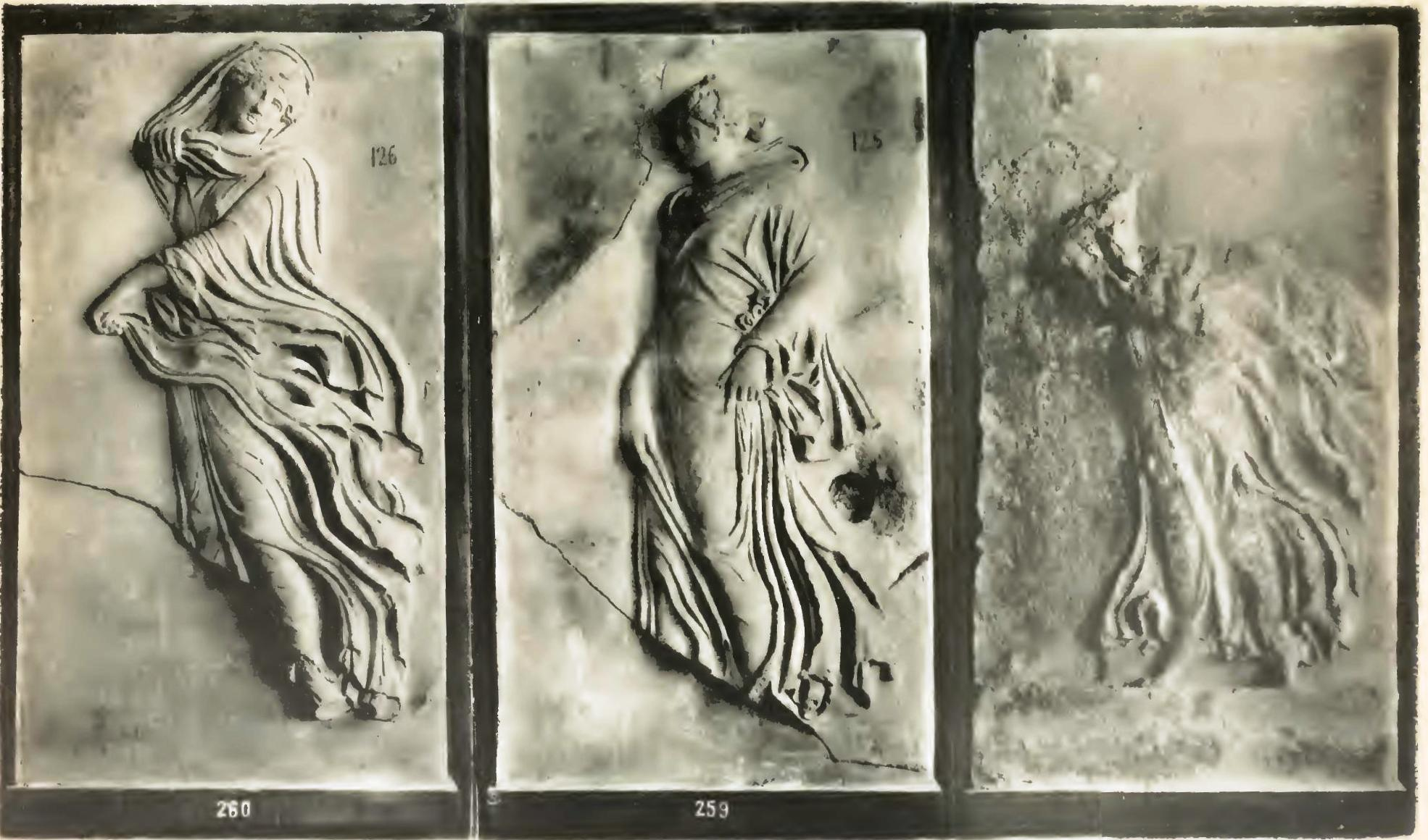 Reliefs der tanzenden Nympfen